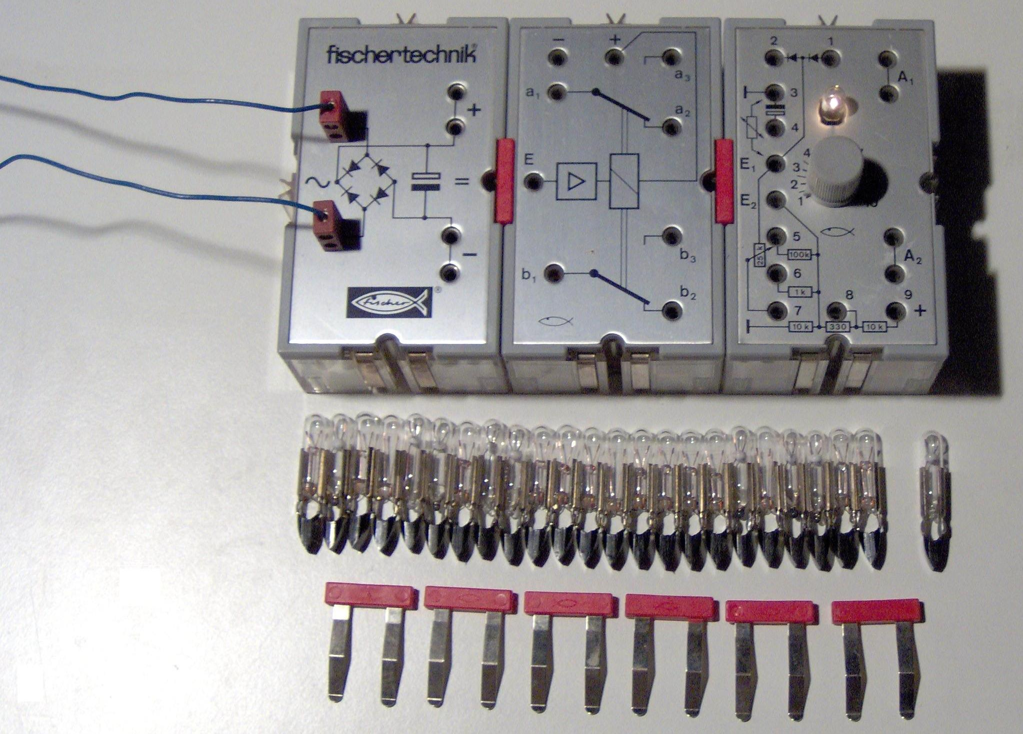 fischertechnik Elektronik-Bausteine mit den Stecklampen und den Verbindern für die E-Bausteine